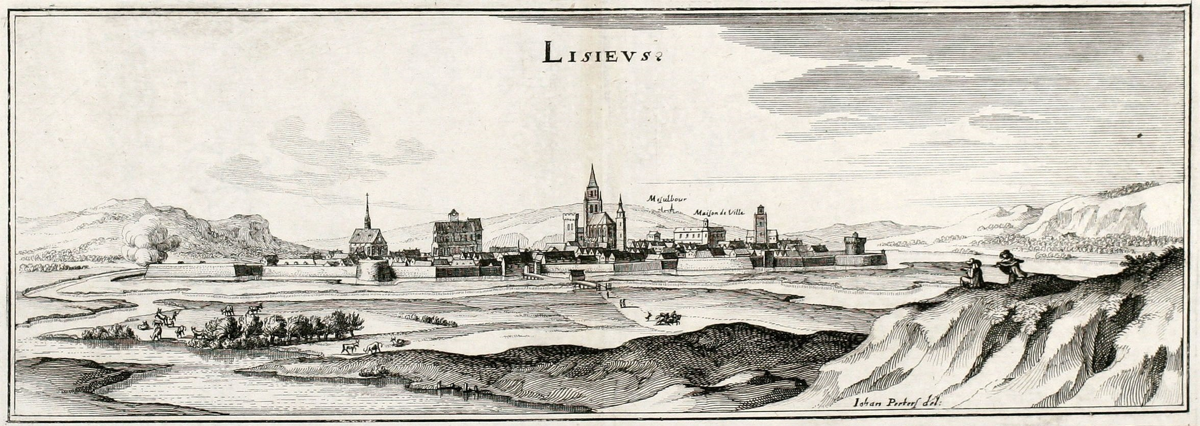 Kupferstich mit einer Ansicht der Stadt Lisieux in Frankreich aus der Topographiae Galliae